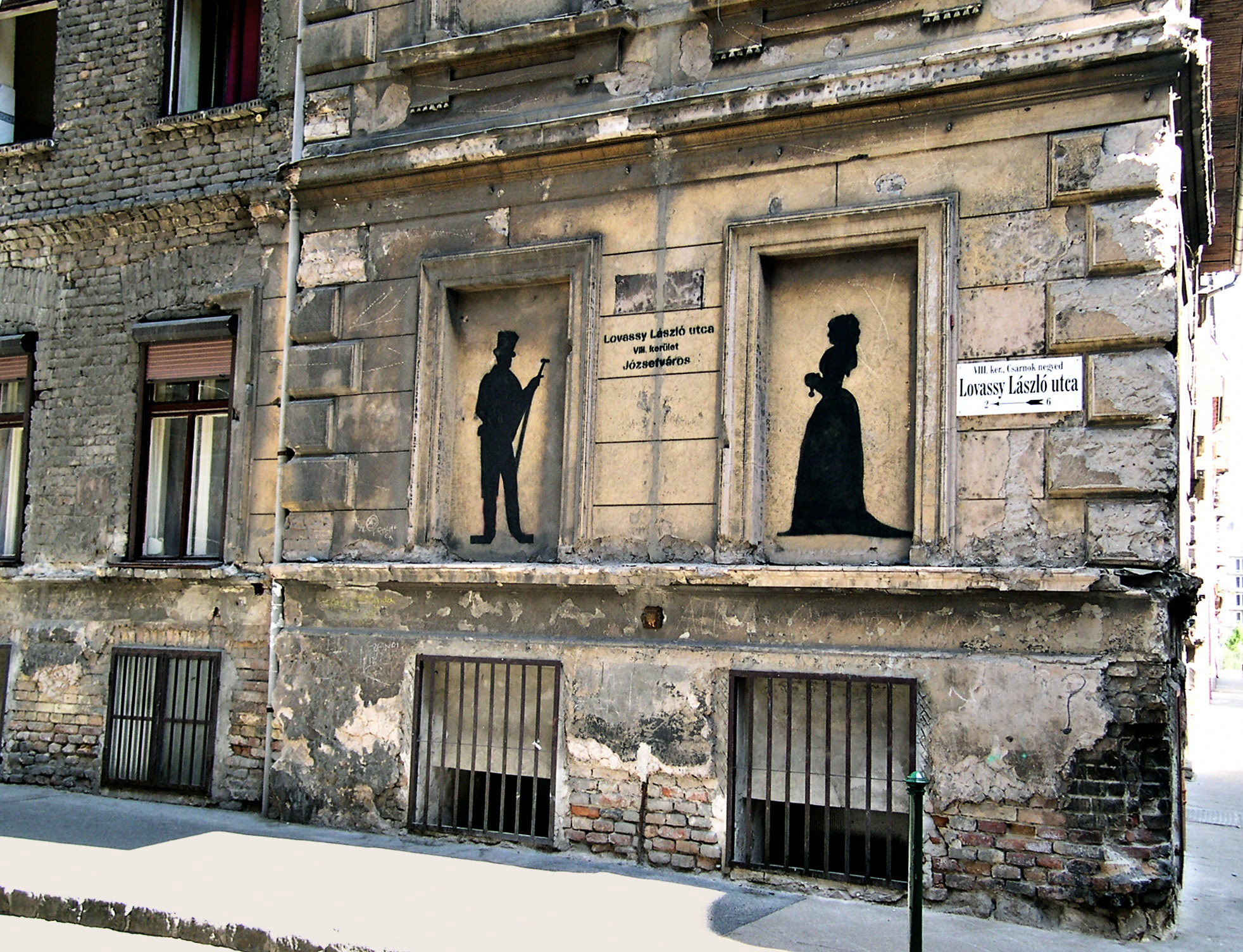 Lovassy utcai graffiti (Budapest VIII.)